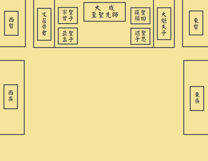 中文（台灣）: 文武聖殿三樓大成殿平面圖；使用本圖片請遵循(CC 姓名標示-非商業性-禁止改作)，Please follow (CC BY-NC-ND 3.0 TW)